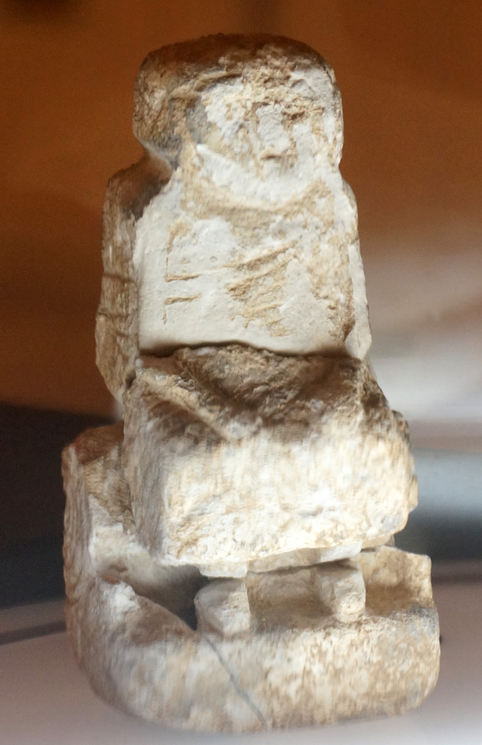 Au Musée st-Remi de Reims. Statuette calcaire du Ie siècle, trouvée à Chalons rue Fery .